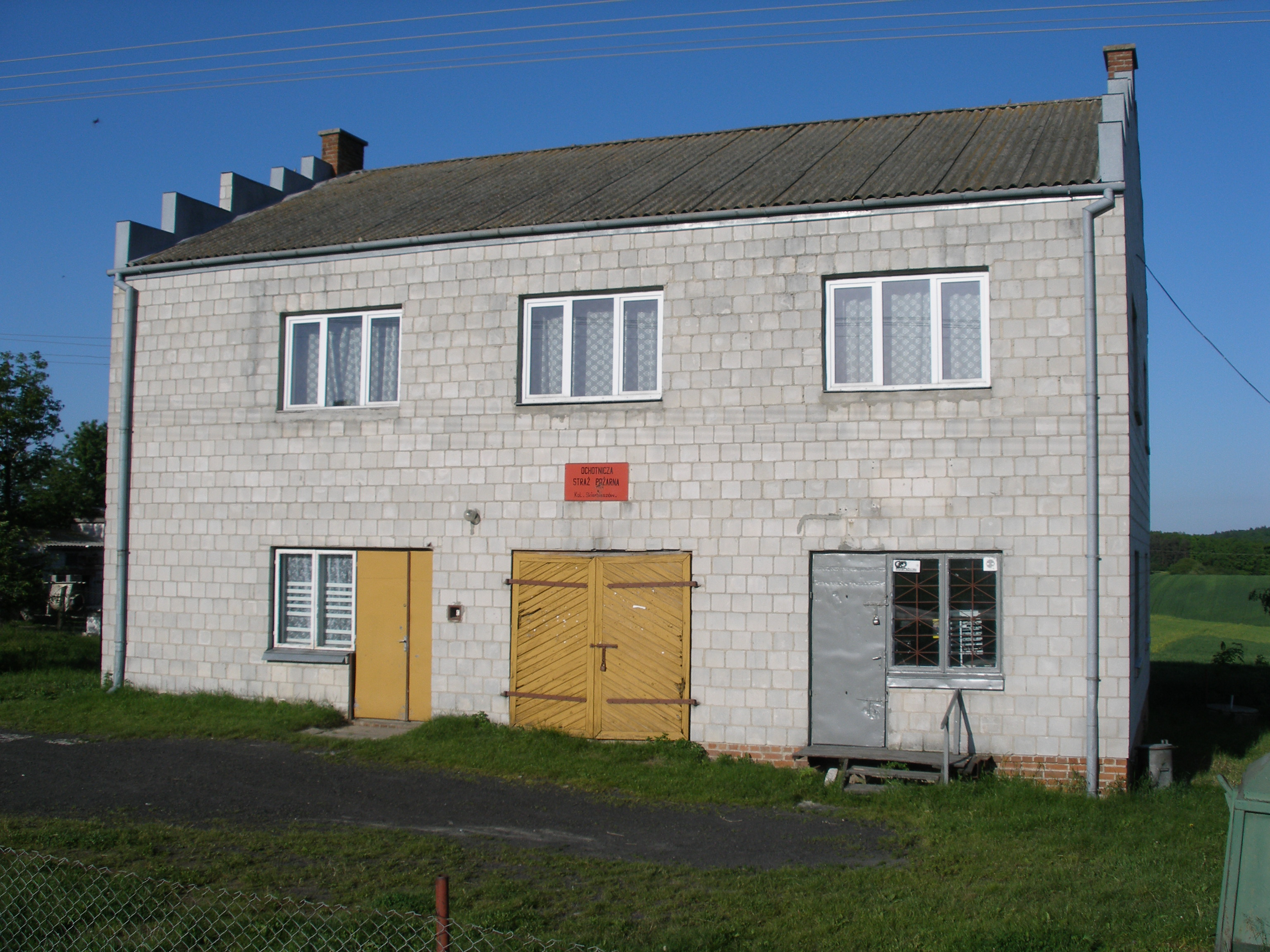 Ochotnicza Straż Pożarna w Kolonii Skierbieszów